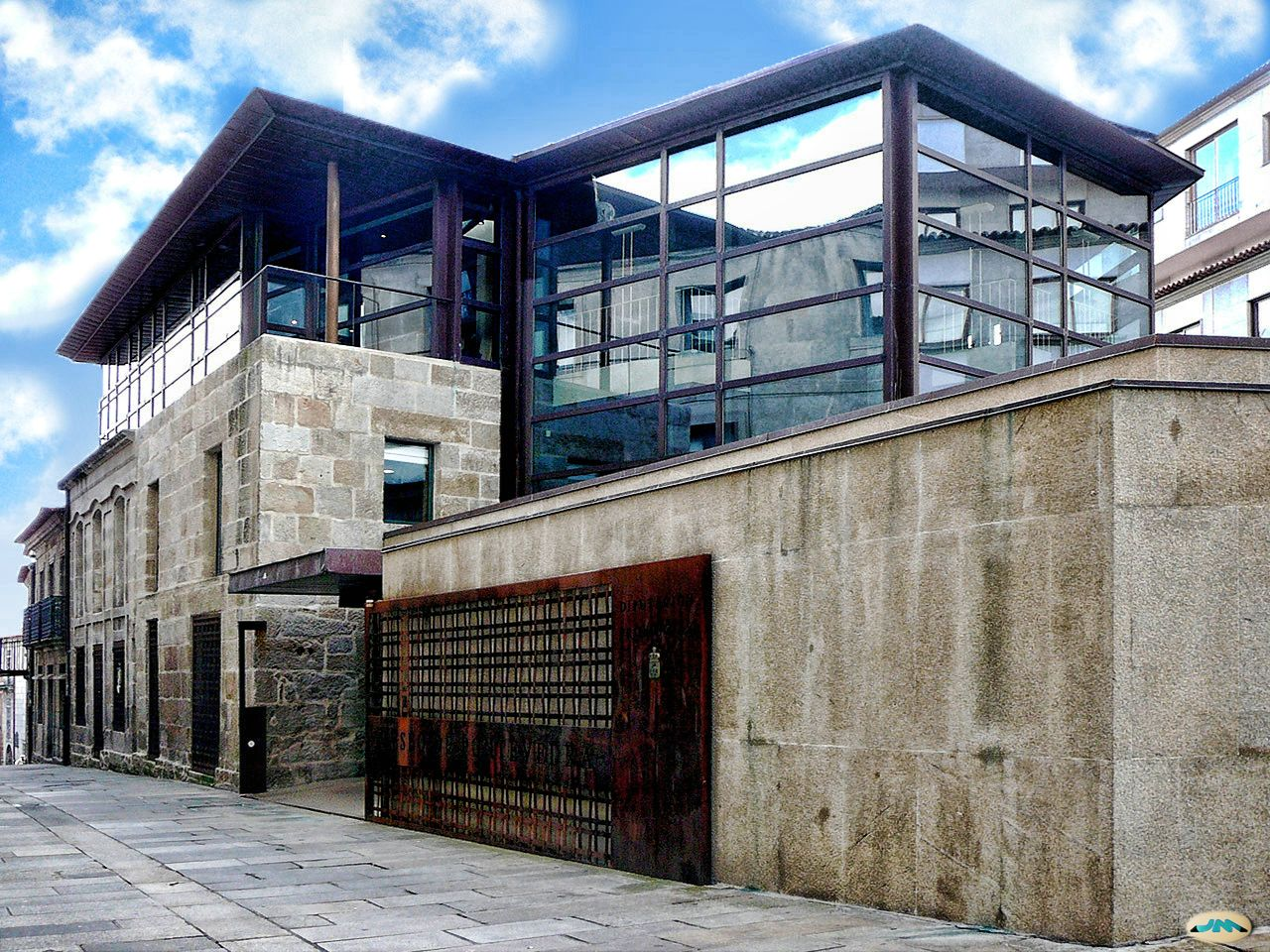 Museo de Pontevedra-Edificio Fernández López-Ampliación